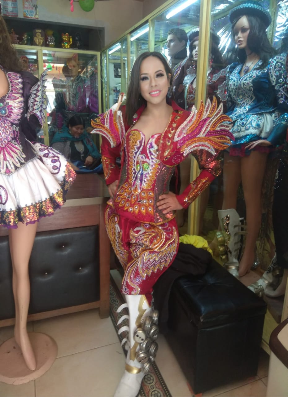 Traje de Macha Caporal